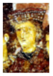 Kraljica Jelena Anžujska, žena kralja Uroša I i majka kraljeva Dragutina i Milutina (freska iy XIII vijeka, u manastiru Sopoćani).